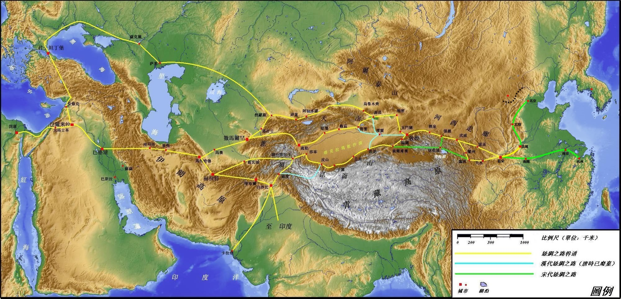 參照的文版相關圖片繪製。唯一的優點可能是使用了zh:中文（正体）。對於古地名的對照，可以嘗試參考zh:絲綢之路的相關内容. 根据zh:commons:Image:20050516220851!Seidenstrasse GMT.jpg制作. Category:中国历史地图